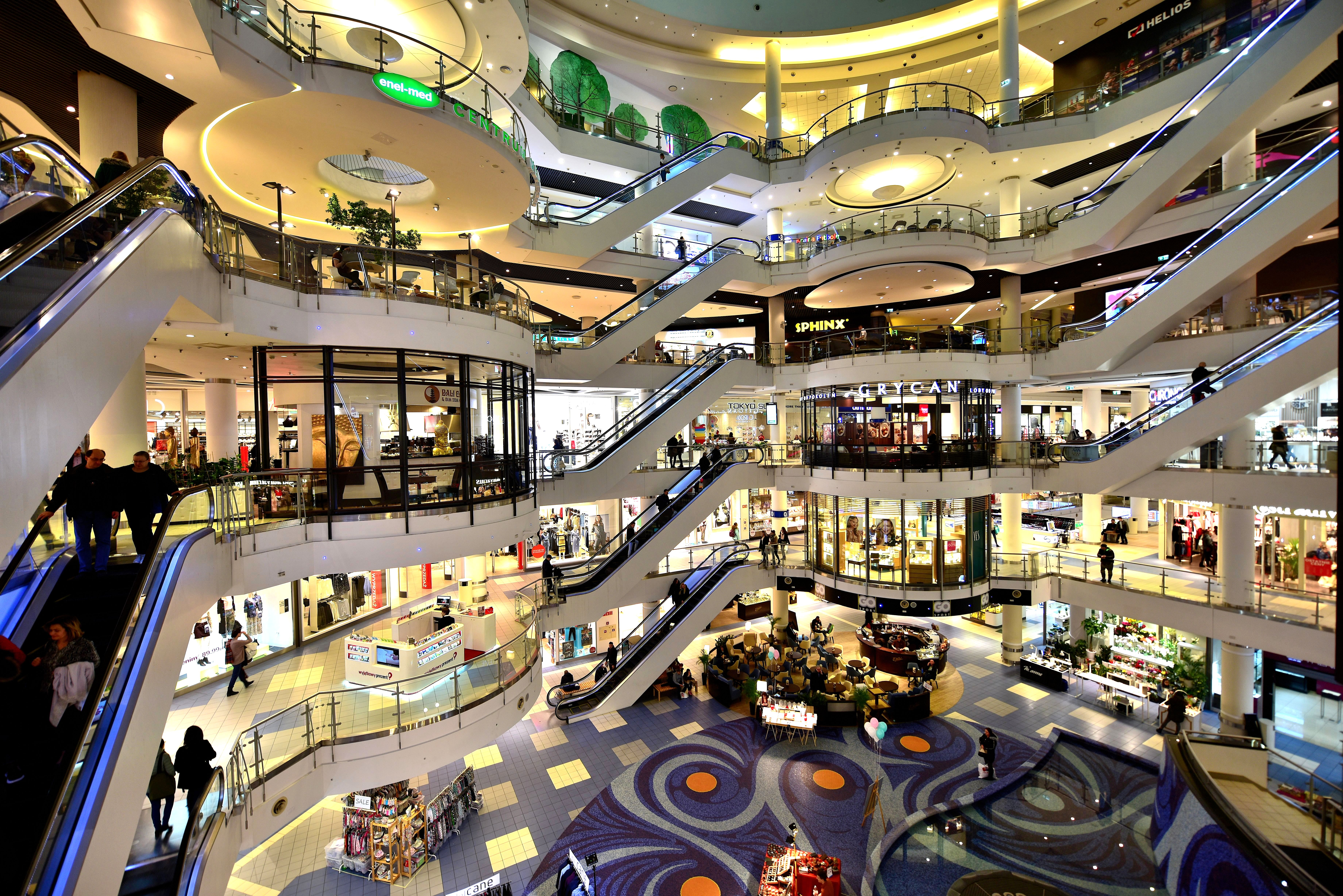 Centrum handlowe Blue City w Warszawie